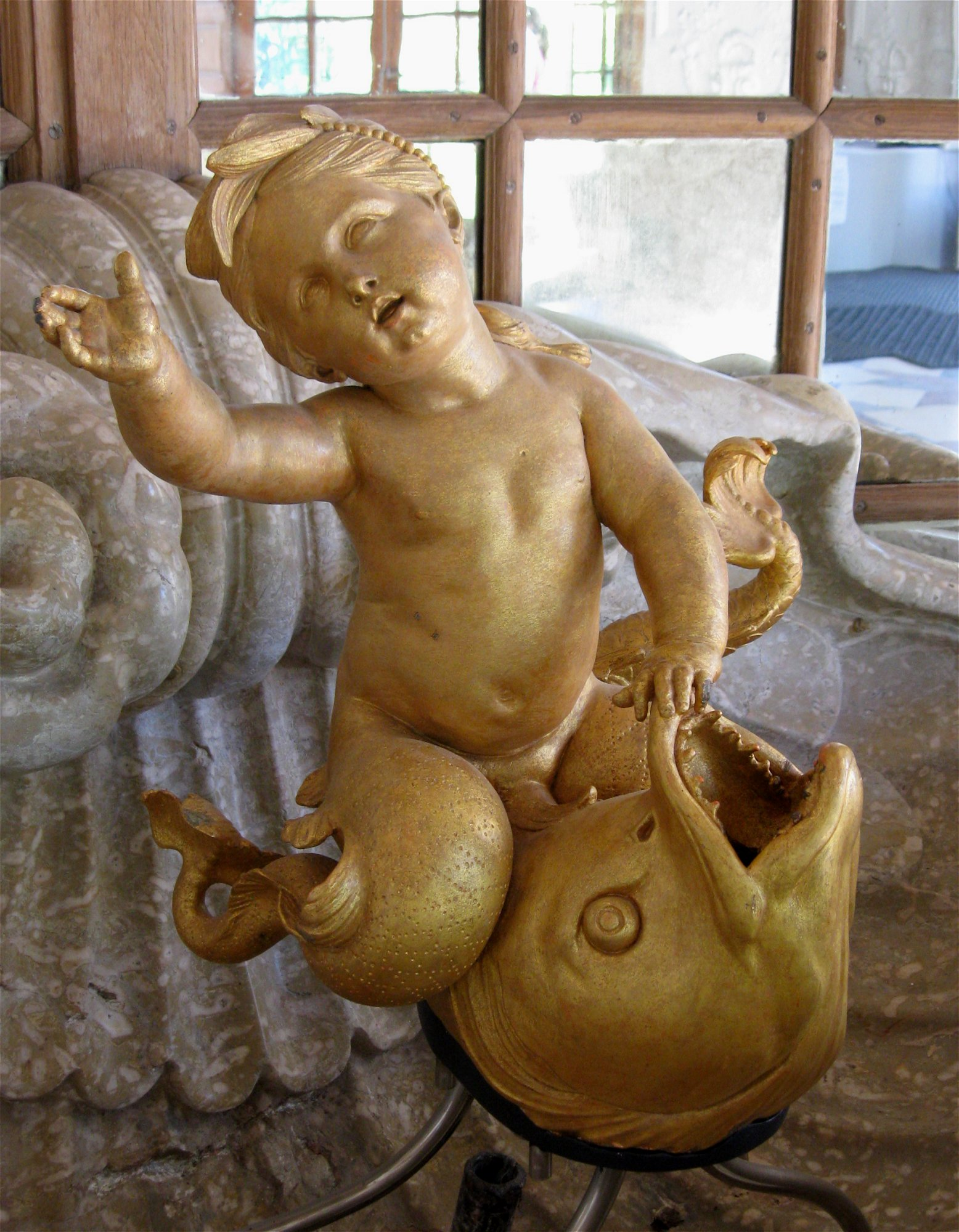 Schlosspark Nymphenburg: Badenburg, Saal, Tritonkind von Guillielmus de Grof (1722)